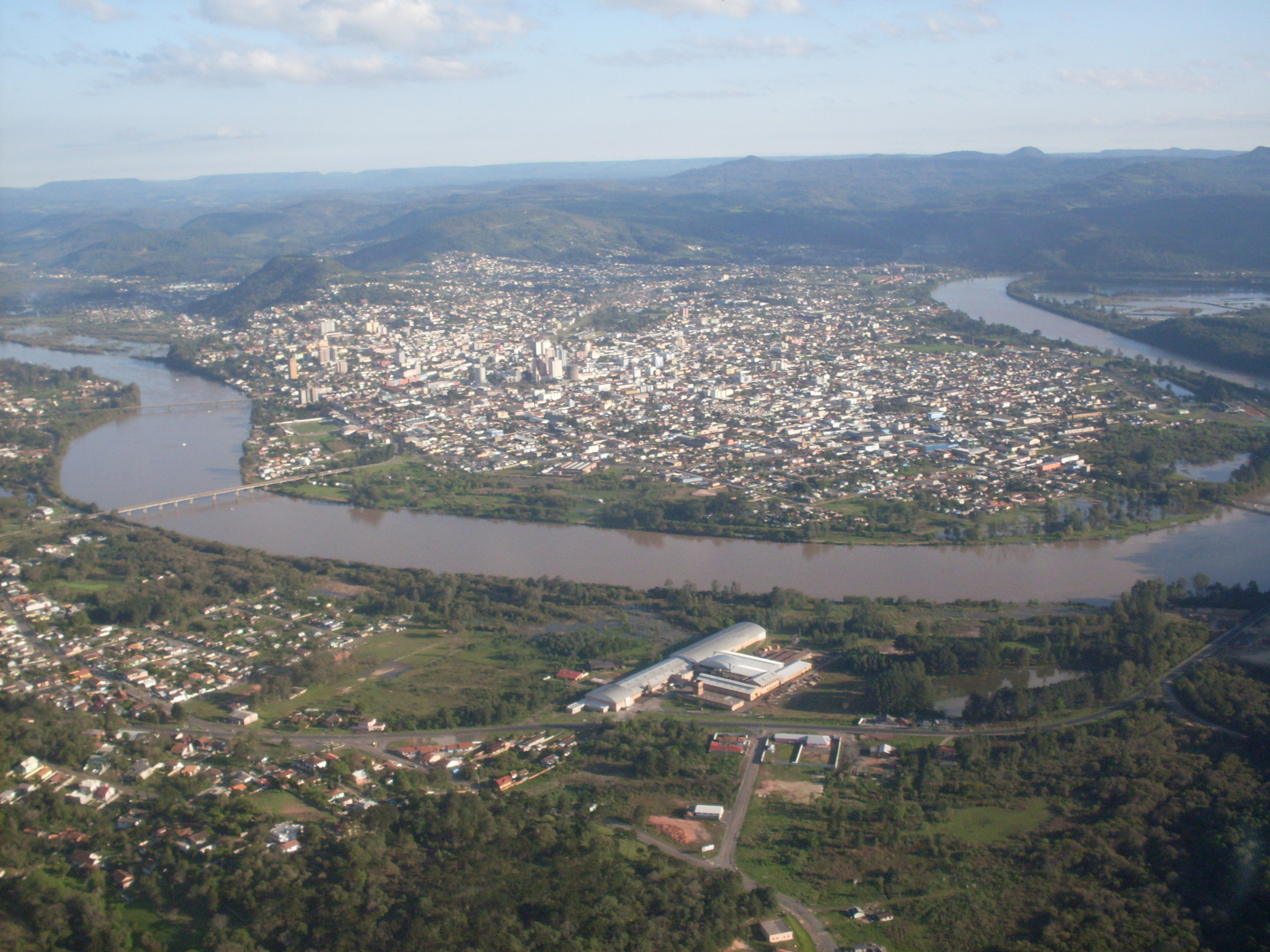 Vista Aérea de União da Vitória - PR